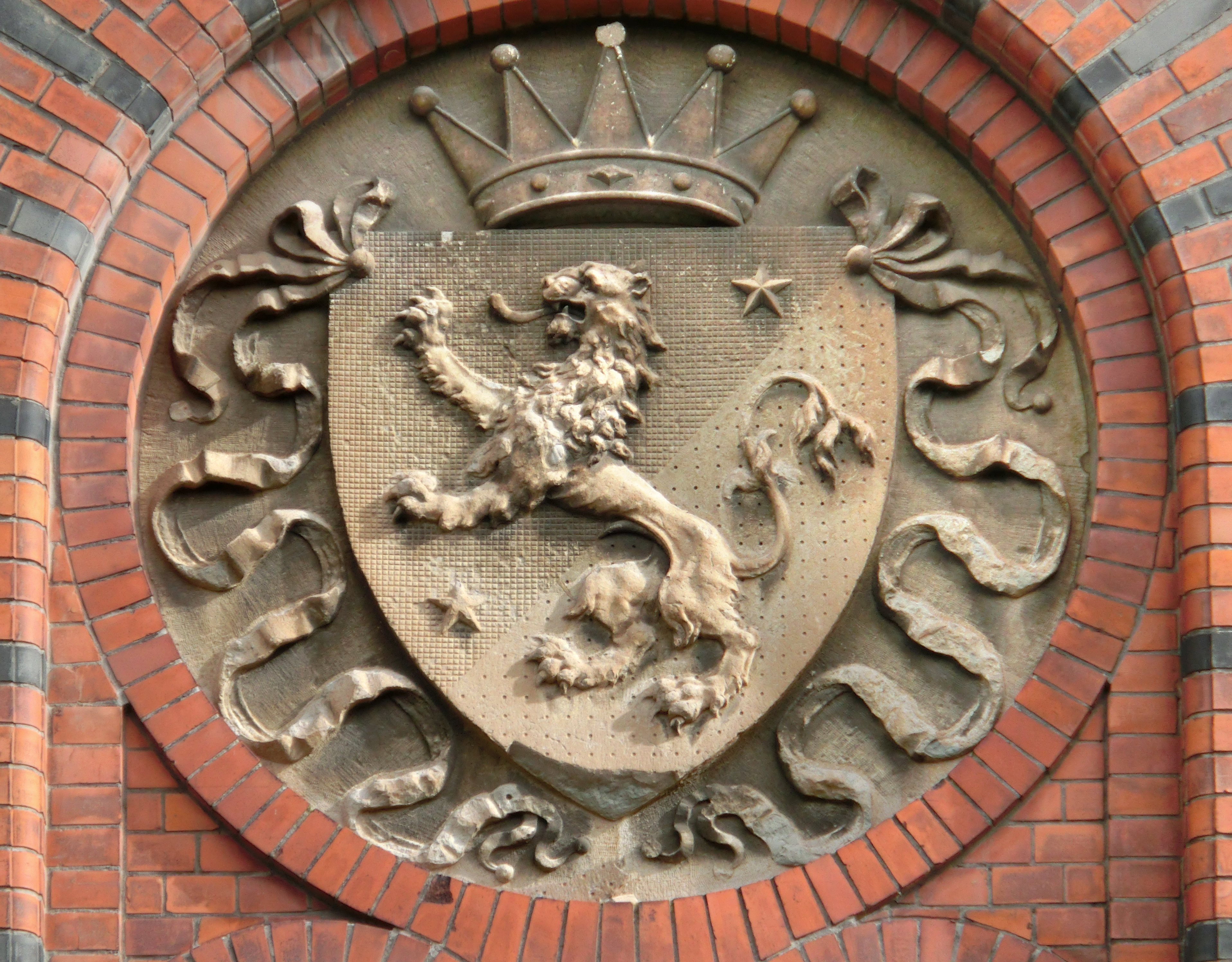 Västergötlands landskapsvapen ovanför entrén till gamla länslasarettet i Falköping, f.d. Skaraborgs län, Västergötland, Västra Götalands län, Sverige. Då vapnet har en hertiglig krona är det Västergötlands landskapsvapen. Samma vapen med kunglig krona hade varit Skaraborgs länsvapen.